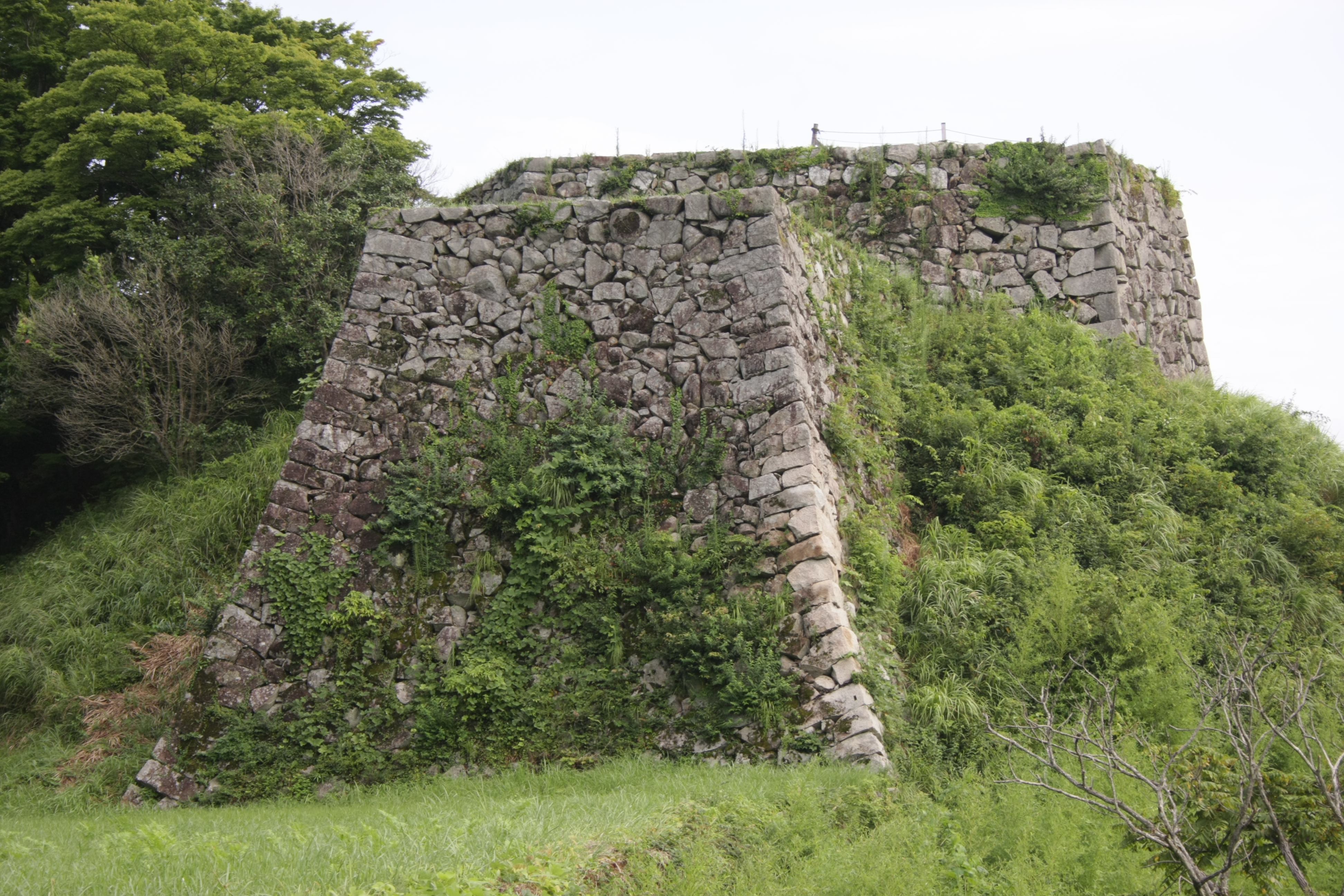 津和野城人質郭、三十間台の石垣